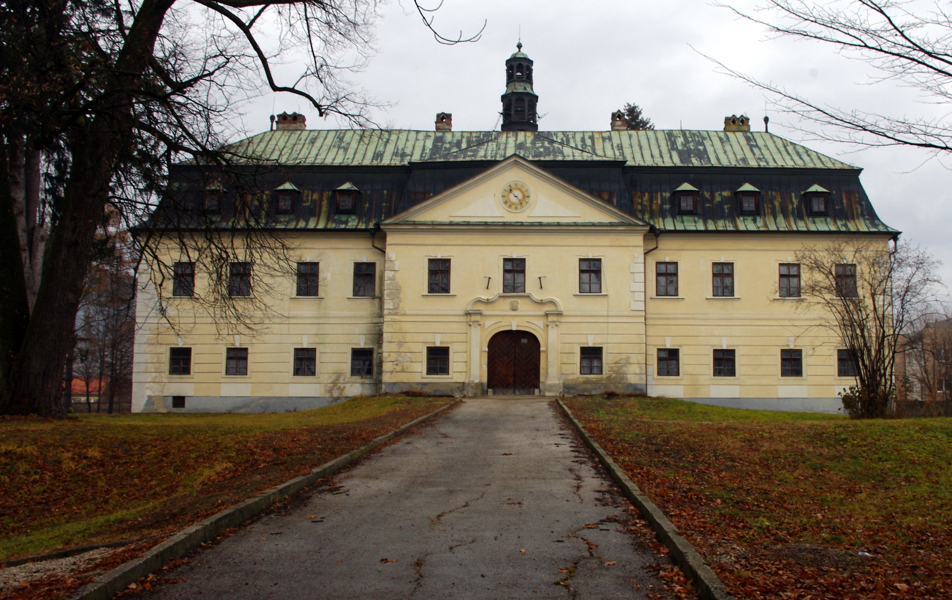 Kaštieľ